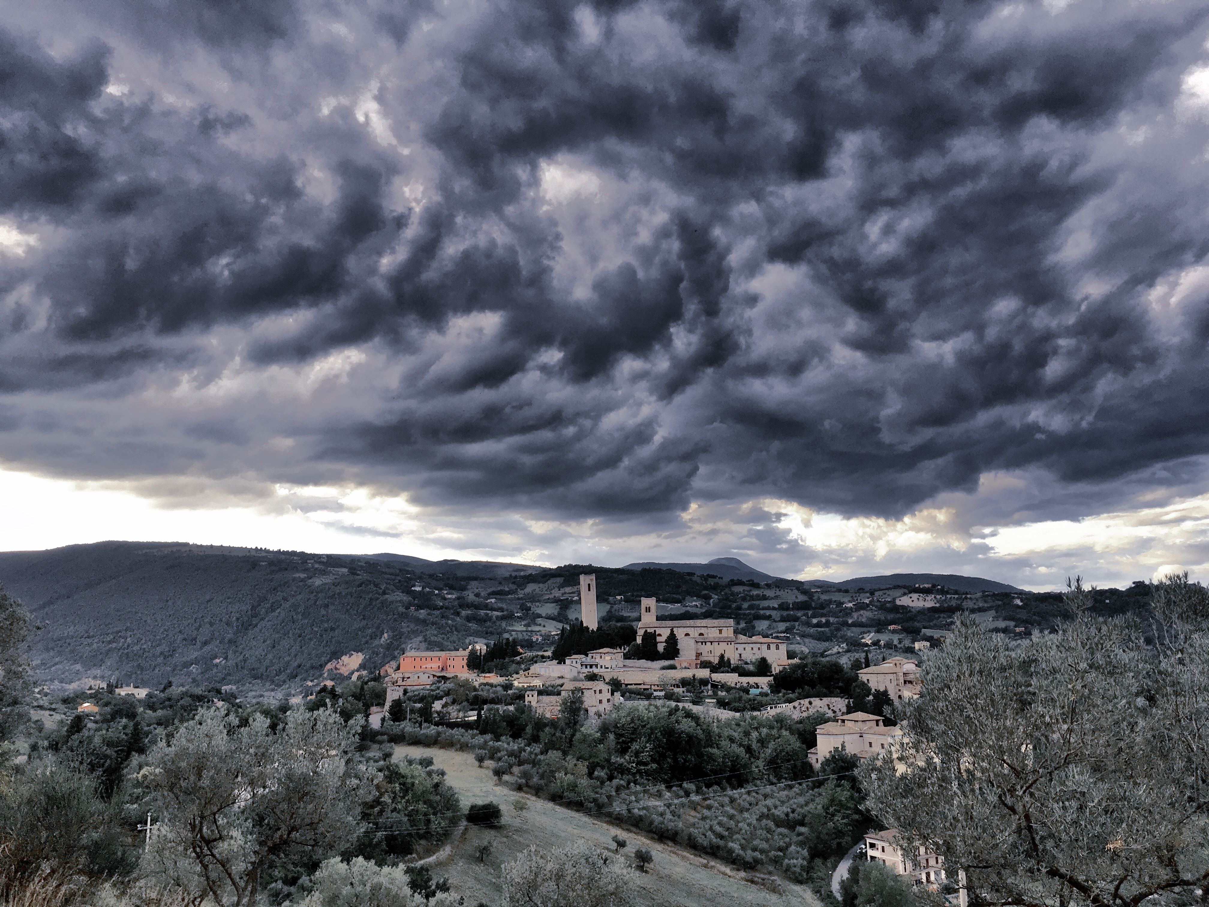 Castello al Monte a San Severino Marche